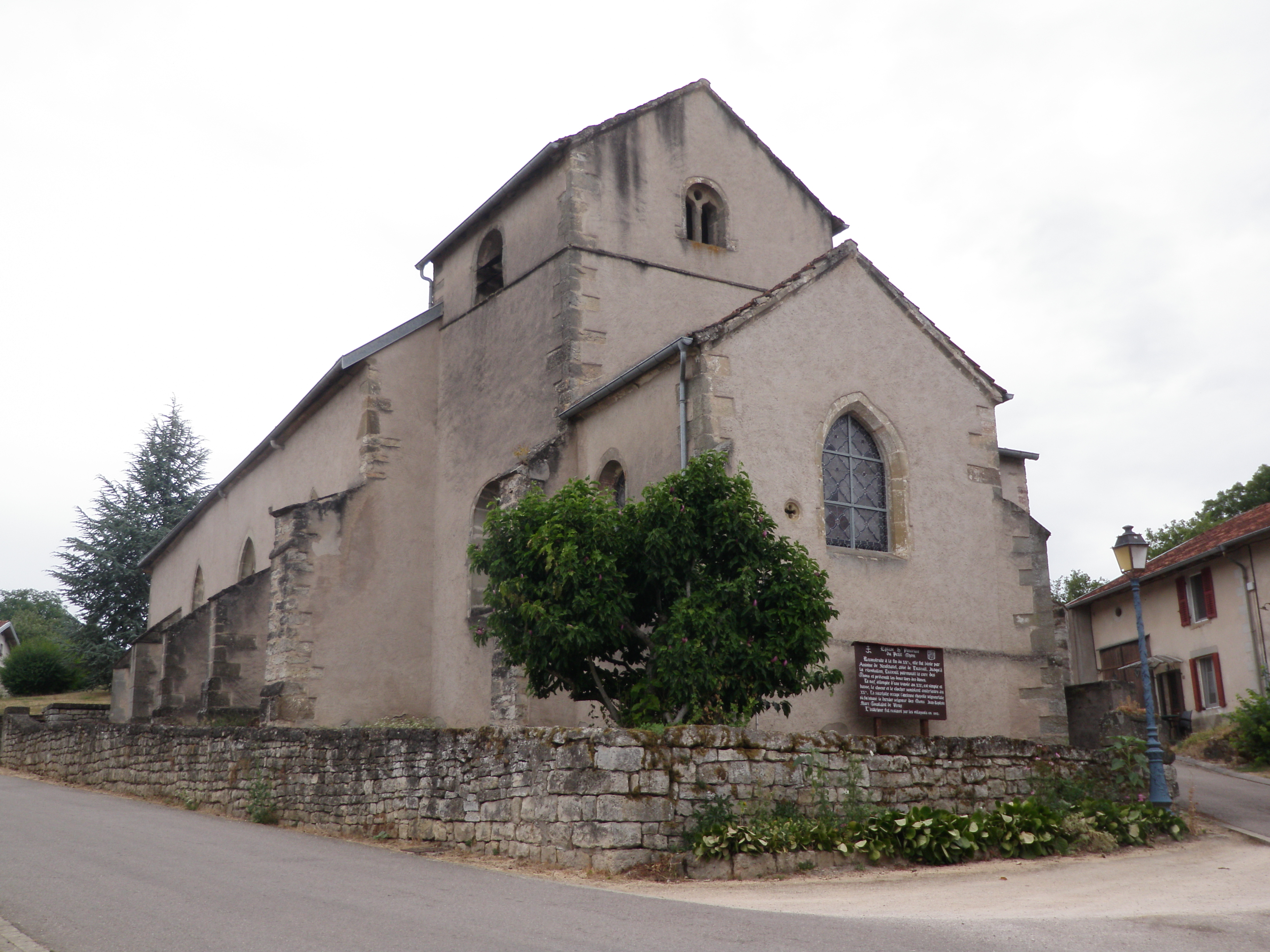 Église Saint-Pancrace du Petit-Thon (commune des Thons)